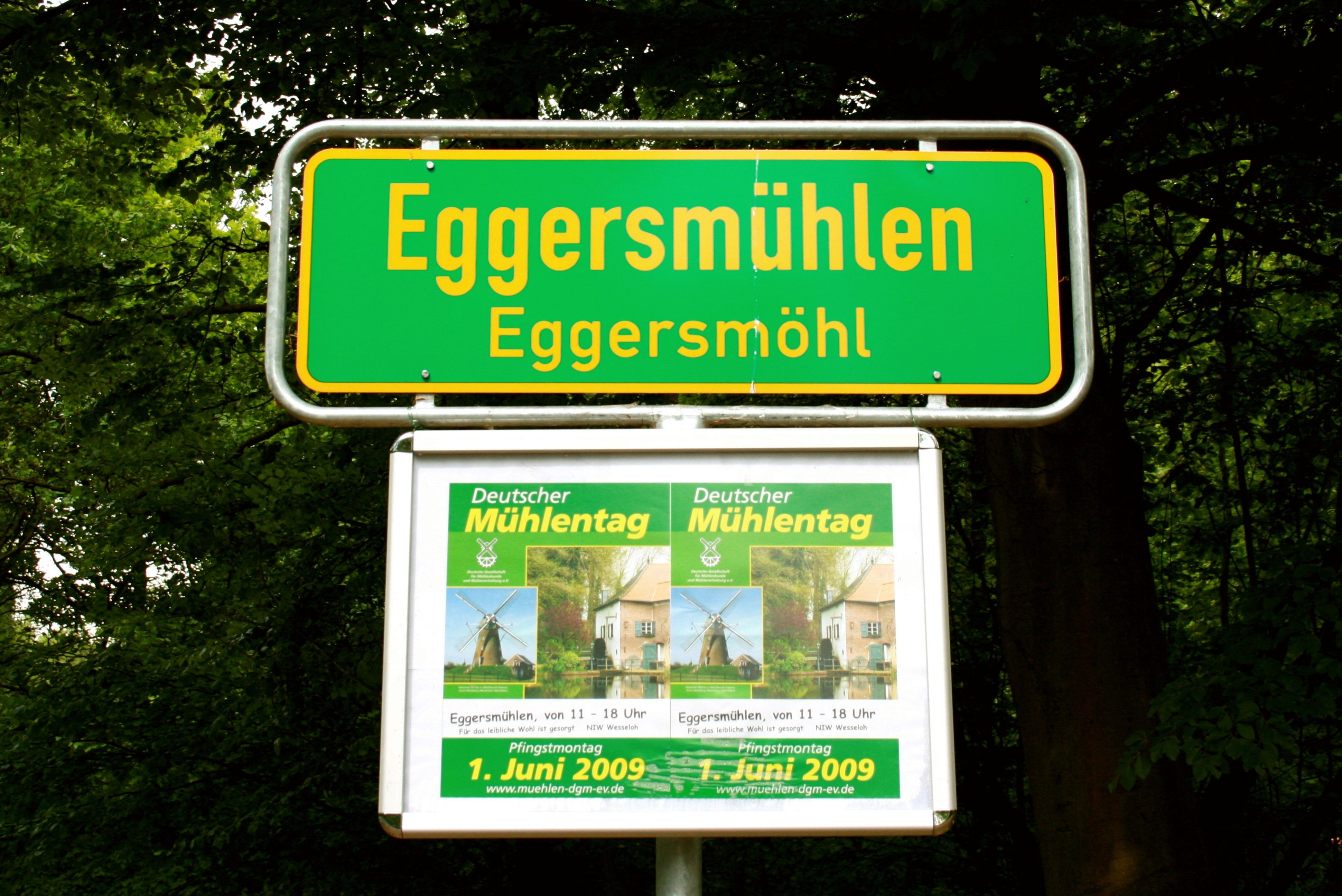 Wassermühle Eggersmühlen an der Fintau in Schneverdingen-Wesseloh/Eggersmühlen